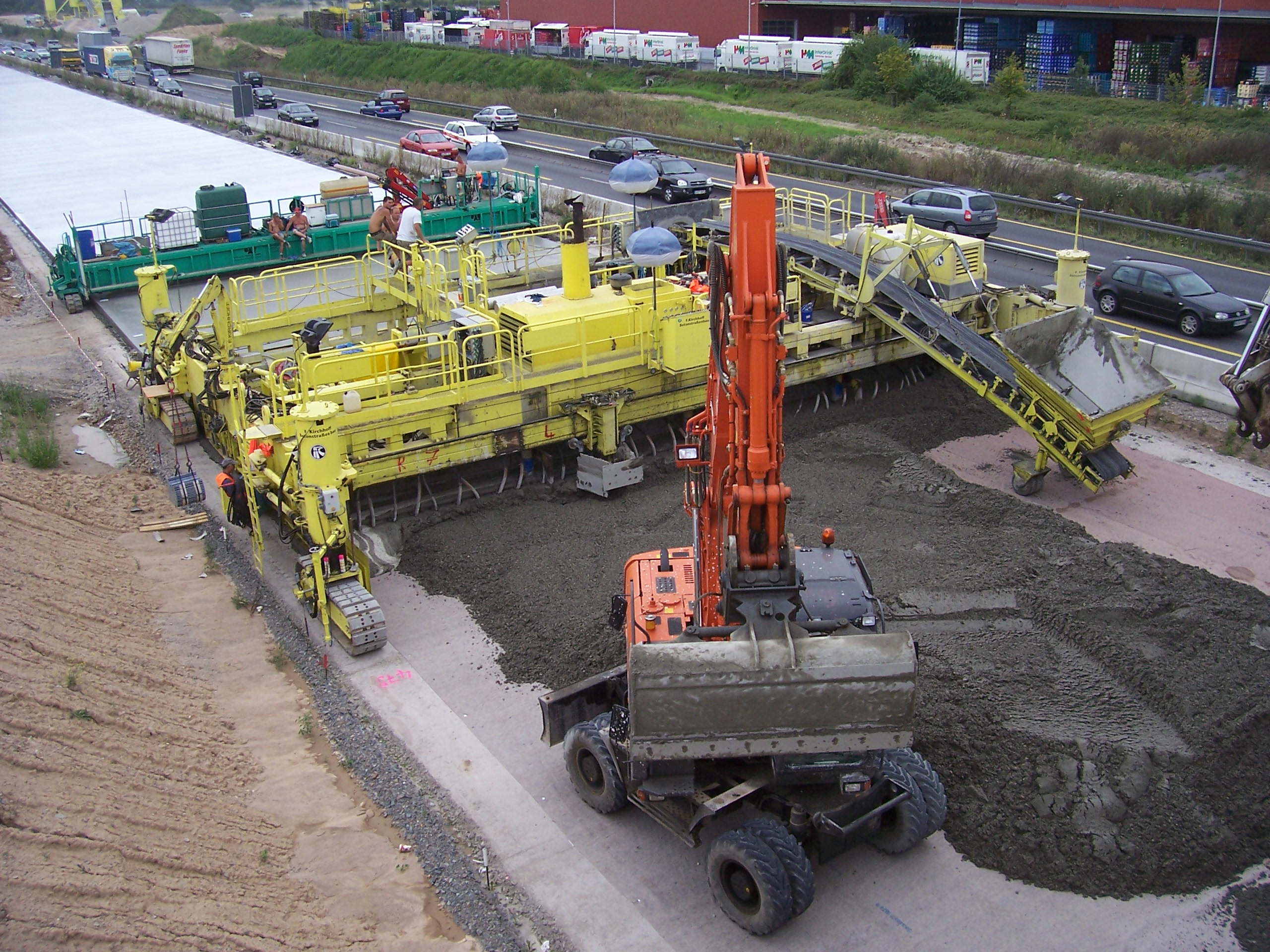 Ein Betonfertiger beim Herstellen des Betonoberbaus der Bundesautobahn A6 bei Mannheim-Wallstadt